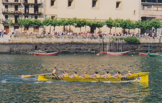 Orio Arraunketa Elkartea 2000ko uztailean San Pedroko Banderan